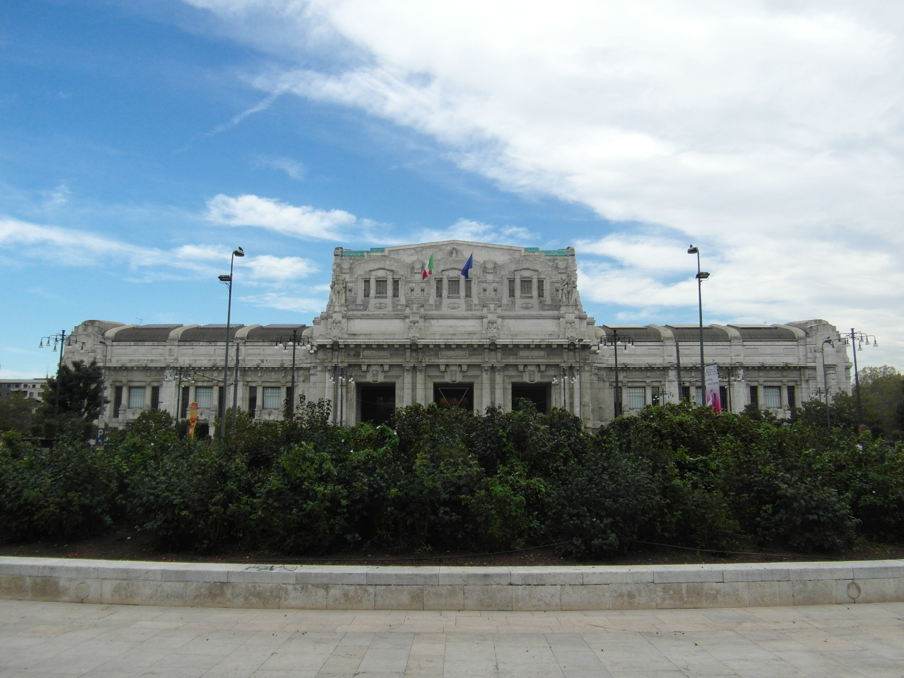 Stazione di Milano Centrale